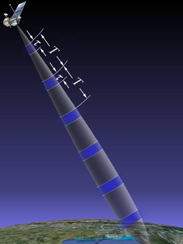 Im High-PRF-Mode werden die Radar-Sendeimpulse mit wesentlich kleineren Impulsperioden ausgesendet, als die Laufzeit der Echosignale benötigt. Die Echos werden „gefaltet“, es wird erst in einer der nachfolgenden Impulsperioden empfangen.